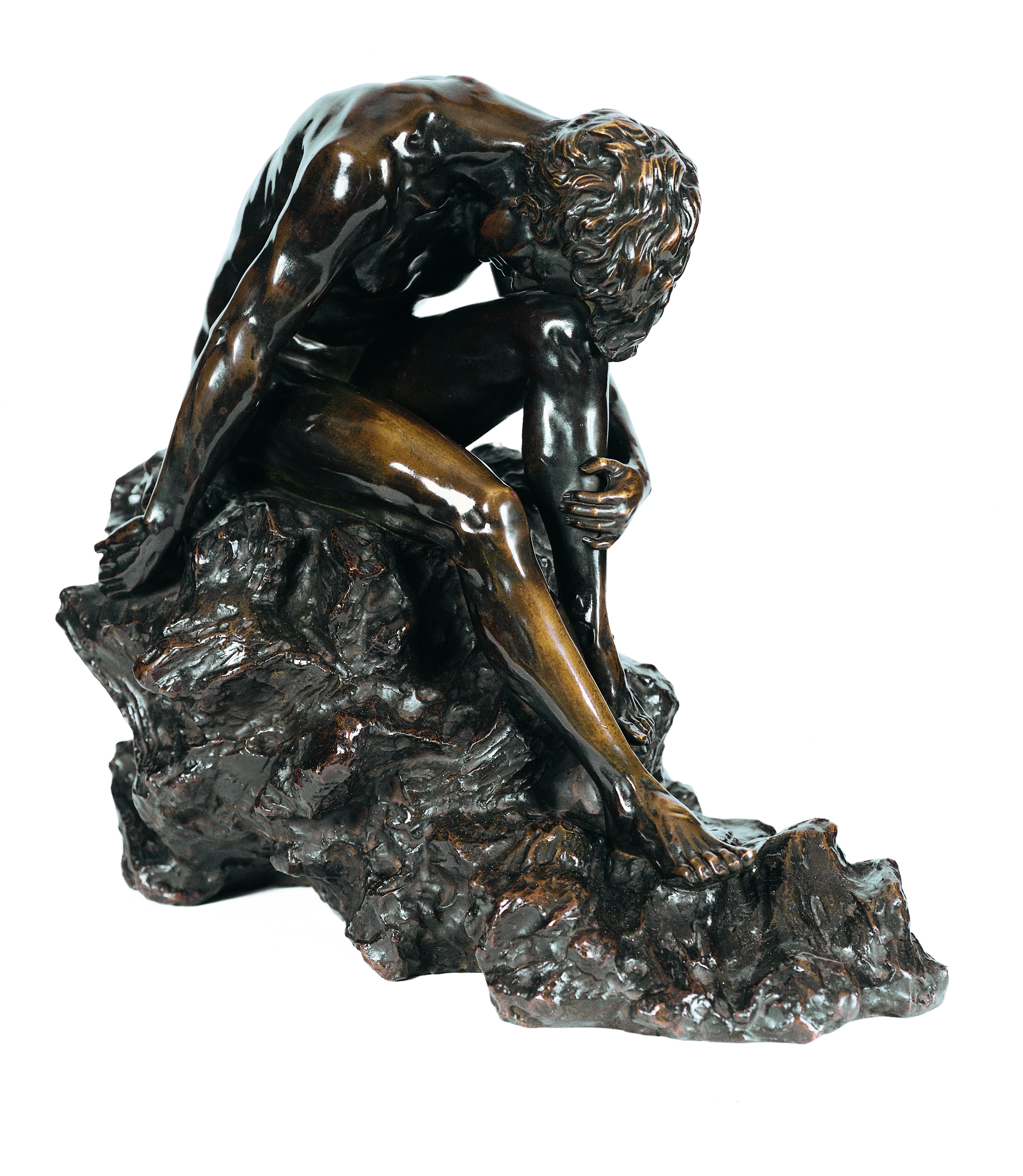 Título: Pensador Autor: Claire Jeanne Roberte Colinet Ano: 1890 Técnica: escultura em bronze Dimensão: 28cm x 45cm